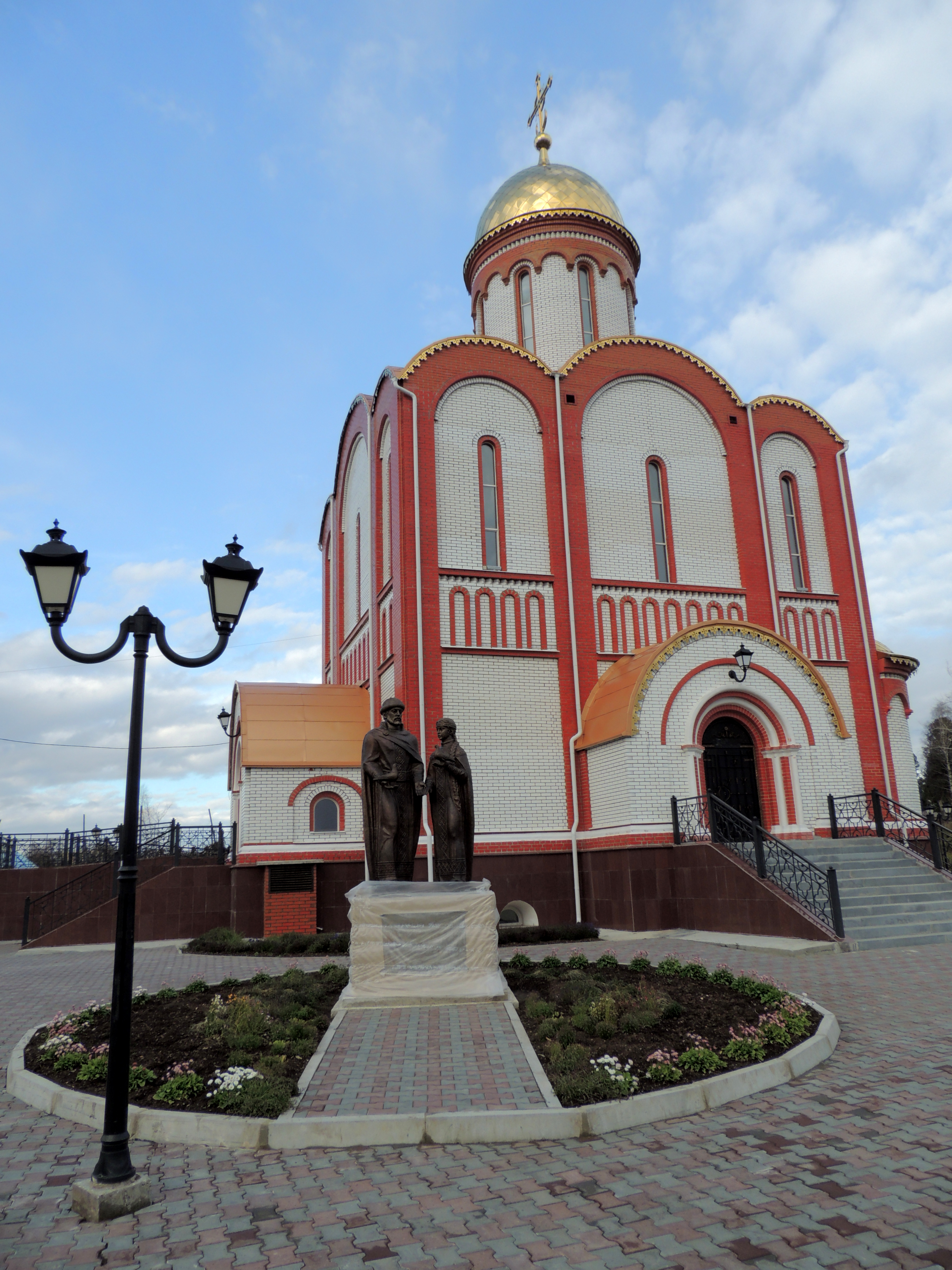 Храма во имя Святителя Николая Чудотворца